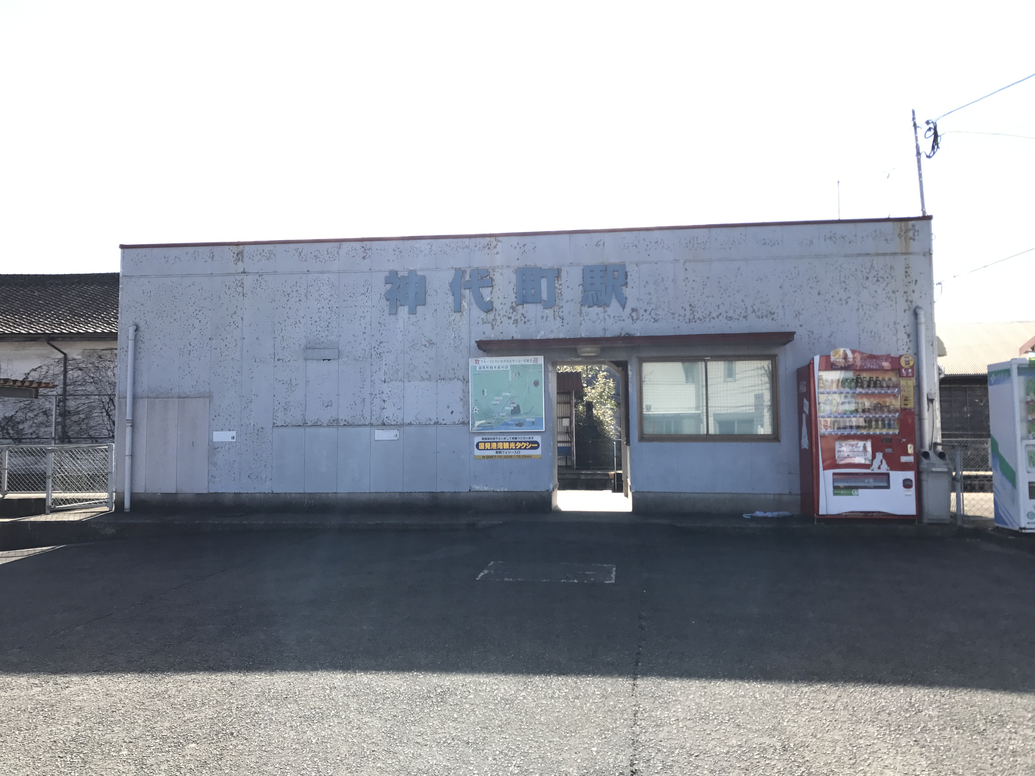 神代町駅駅舎